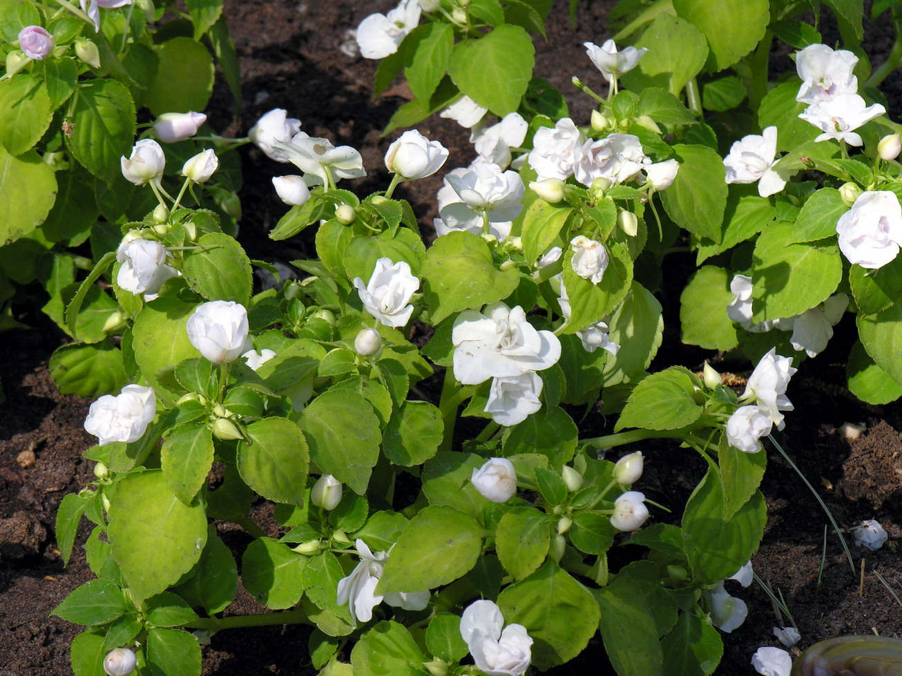 Valero sprigė (Impatiens walleriana) Šeima. Spriginiai (Balsaminaceae) Fotografavo: Algirdas, 2006 m. gegužės 10 d., Lietuva